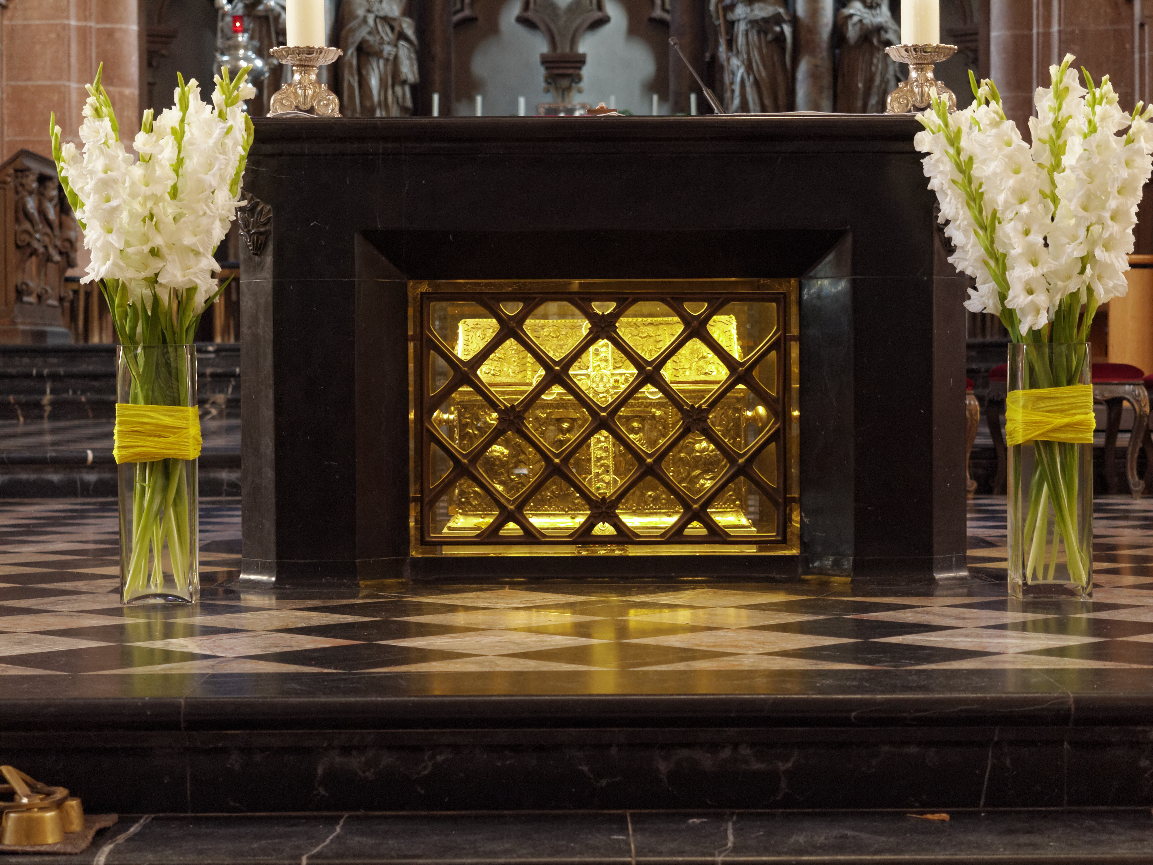 Basilika St. Marcellinus und Petrus in Seligenstadt, Reliquienschrein unter dem Altar, Baudenkmal in Hessen